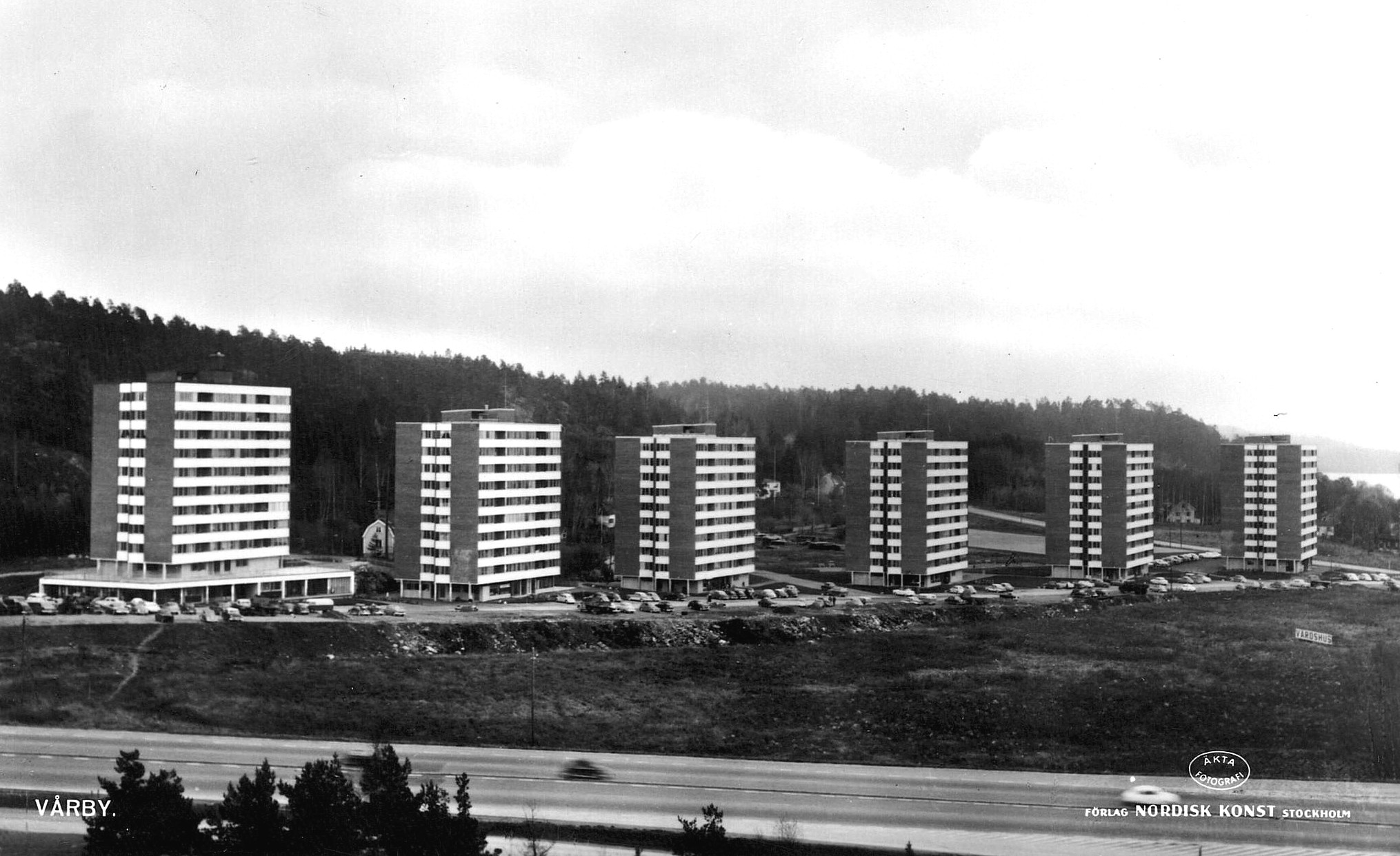 Vårby Haga omkring 1962, de sex punkthusen innan "Ormen Långe" uppfördes